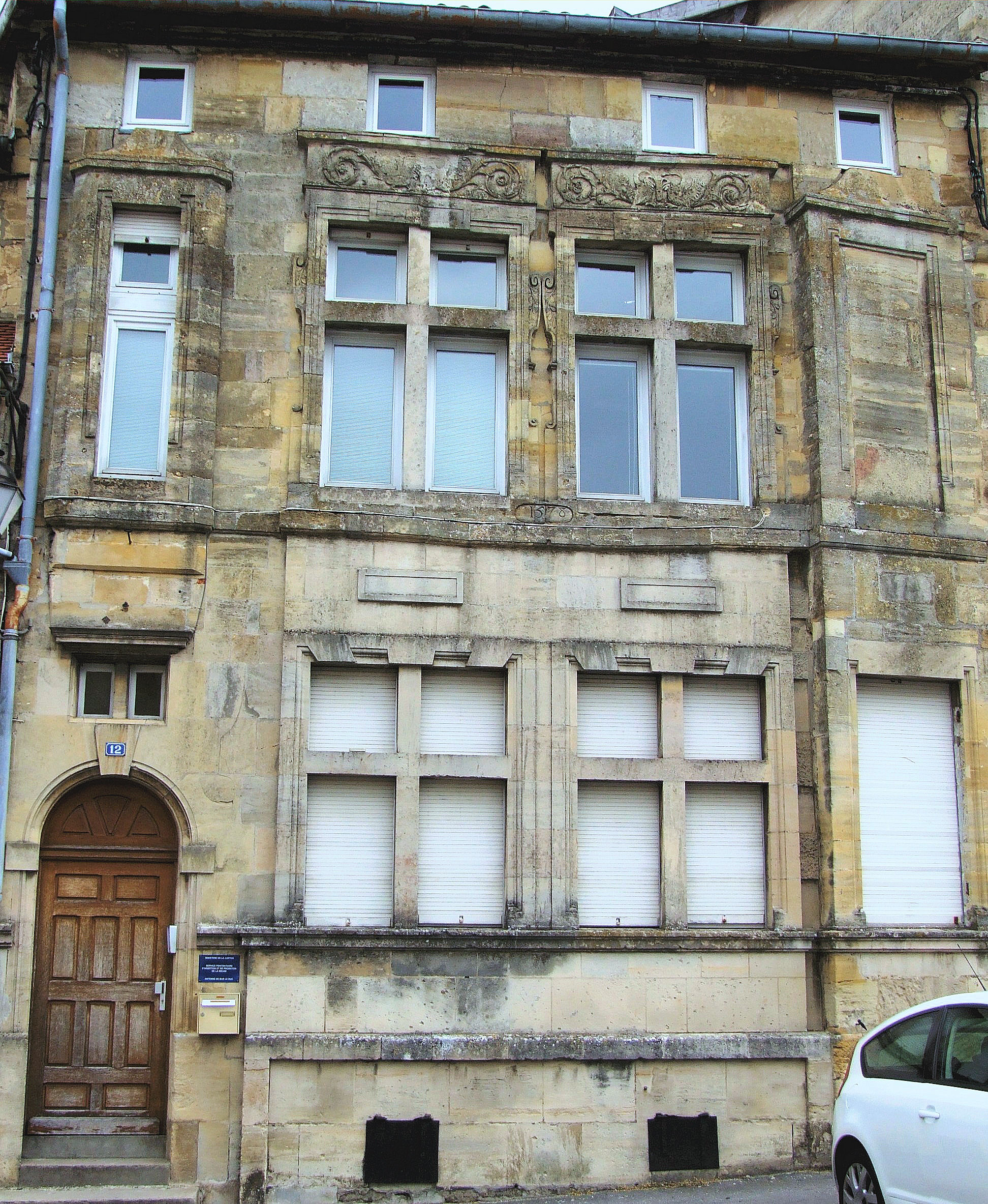 Bar-le-Duc - 12 place de la Halle